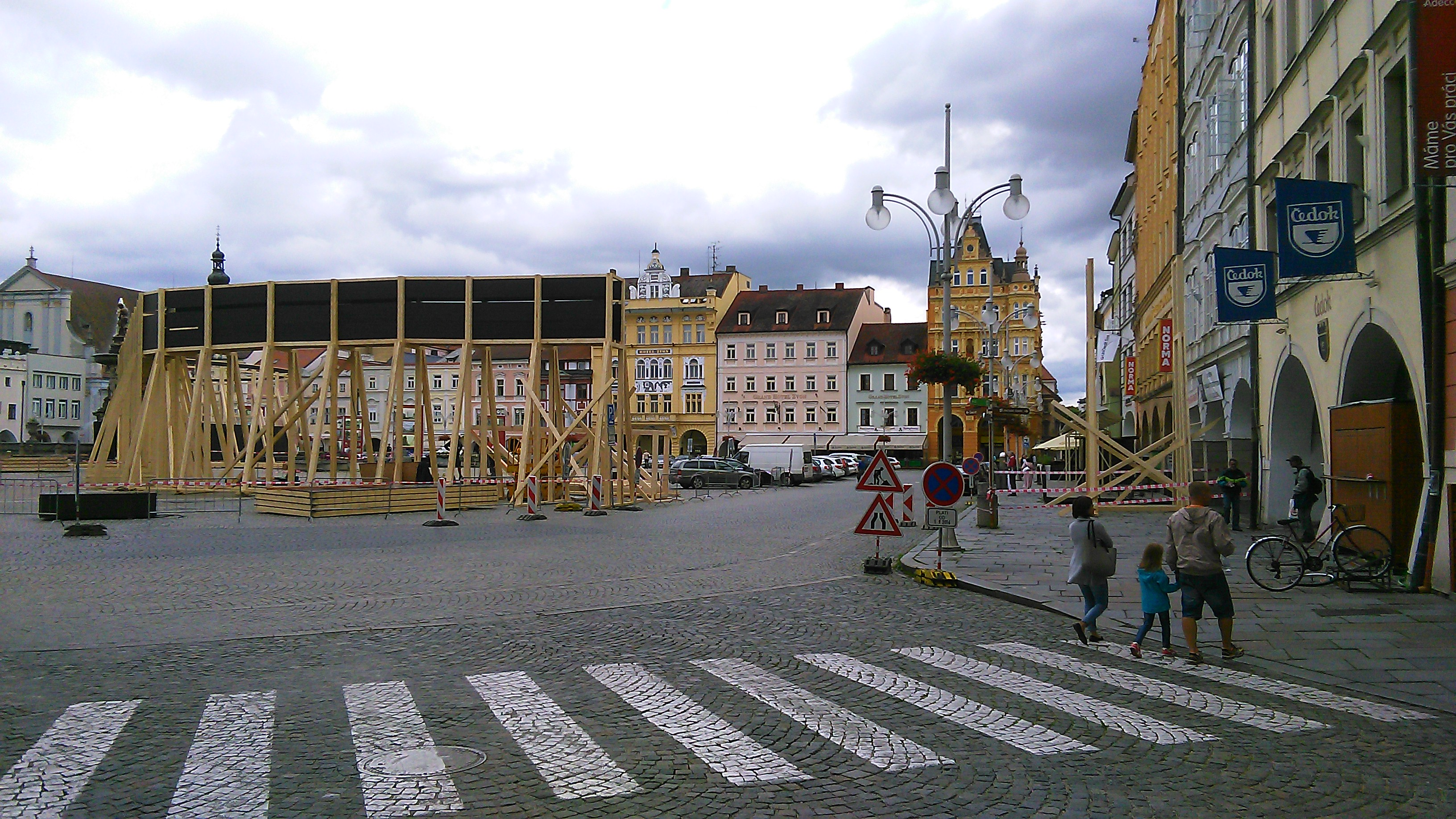 Výstava Vnímání